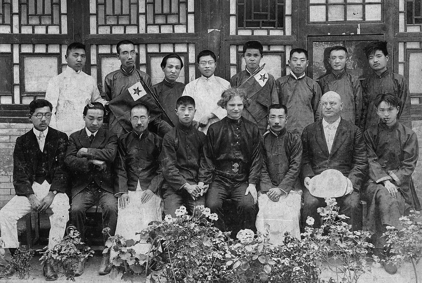 Vasilij Eroŝenko kun grupo de siaj Esperanto-lernantoj en Pekino. En la 1-a vico sidas, de maldekstre: 3-a: Zhou Zouren, 5-a: Vasilij Eroŝenko, 6-a: Lusin, 7-a: s-ro Sofoklov